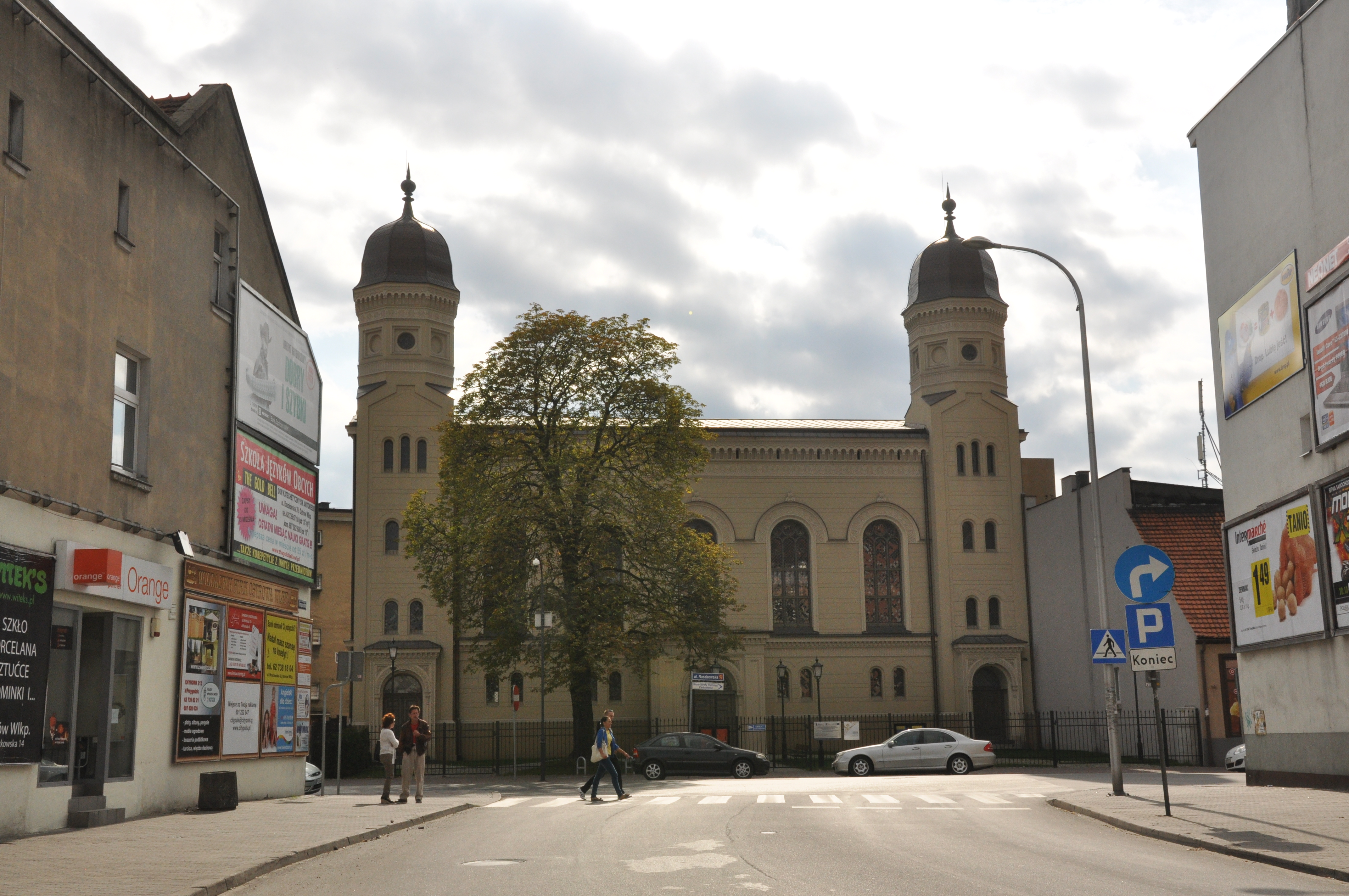 Ostrów Wielkopolski, ul. Raszkowska - synagoga z lat 1857-1860 (zabytek nr 434/A)